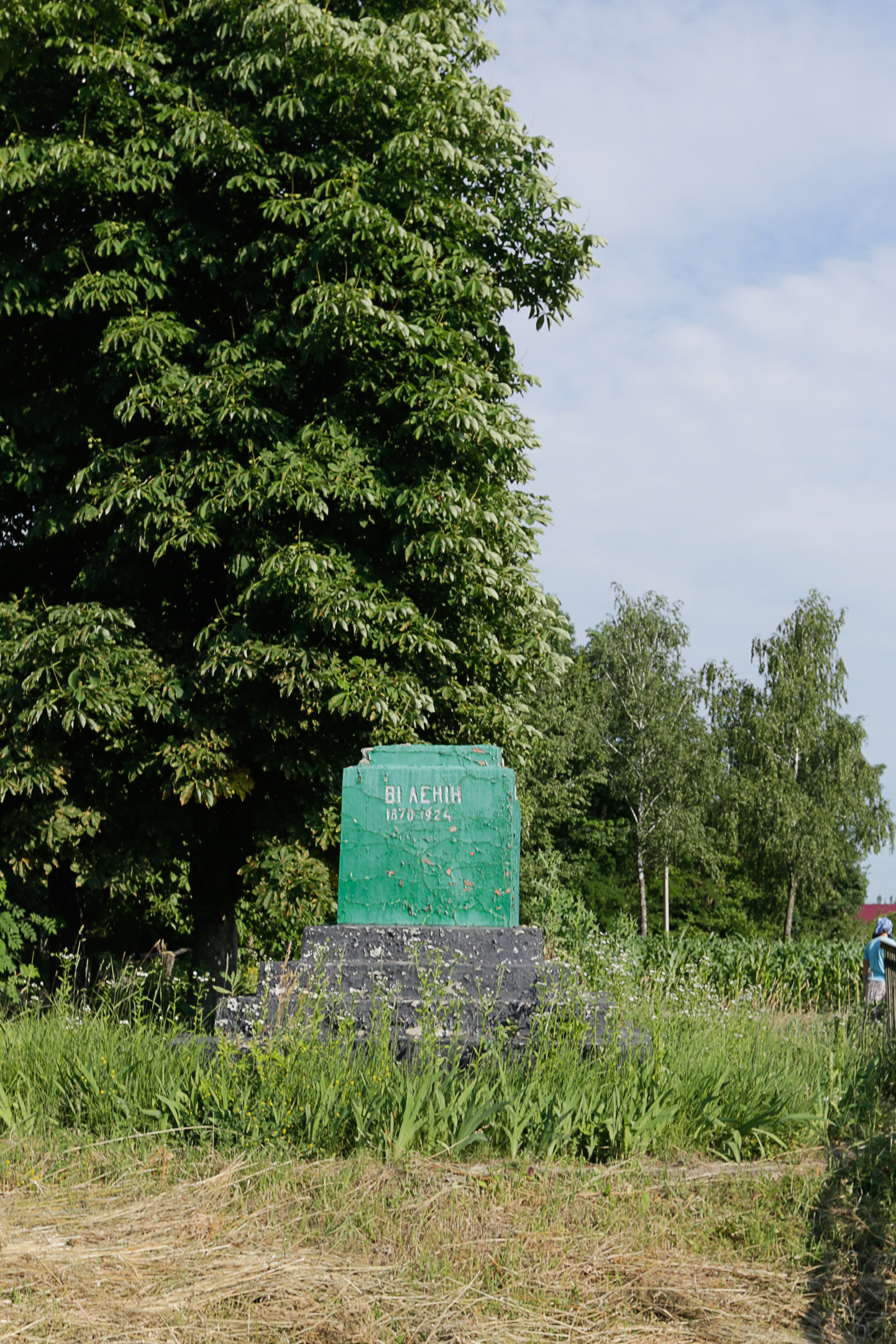 с.Івашківці. Новоушицький район. Хмельницька область.